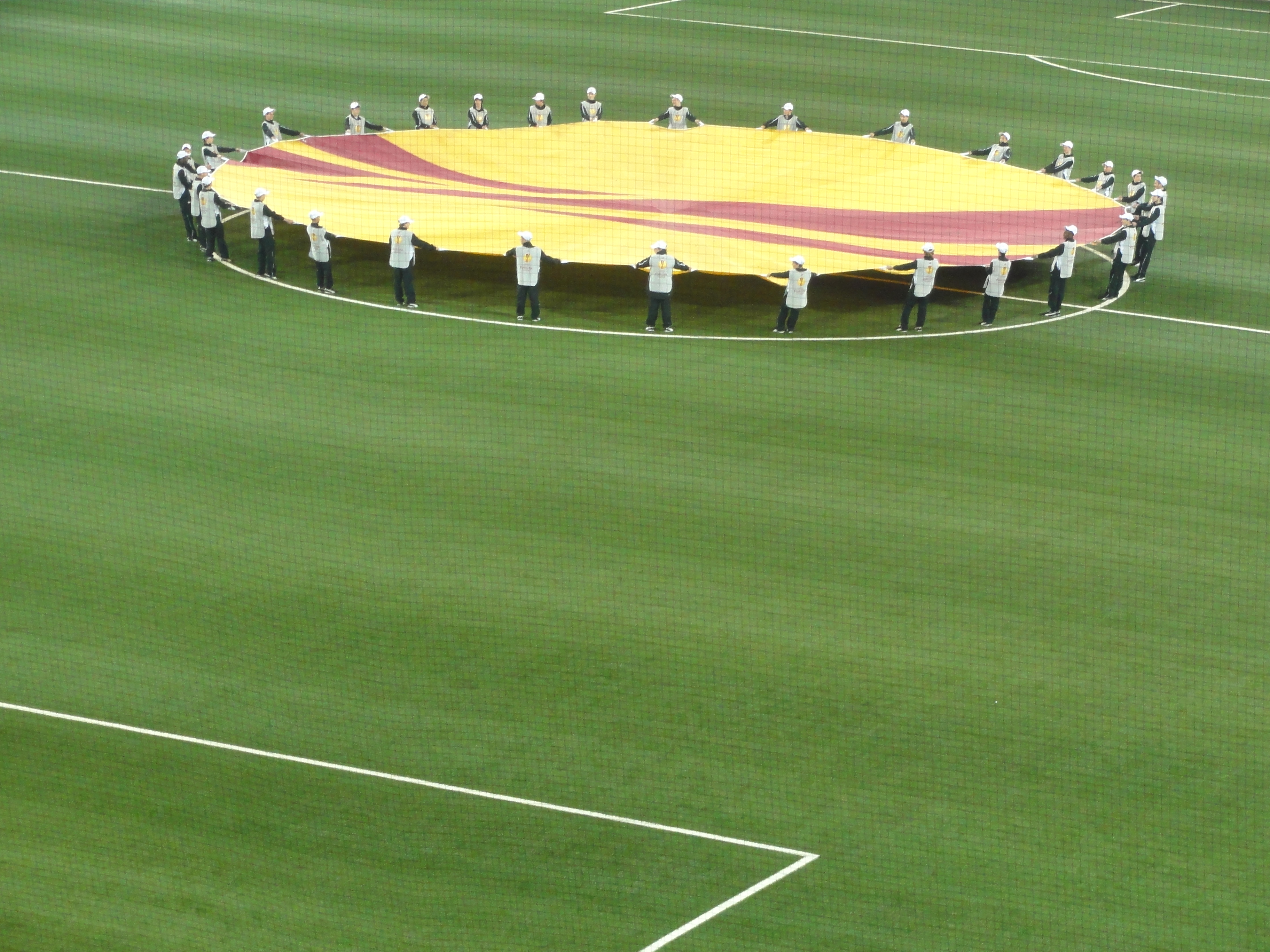 europa league stade de suisse